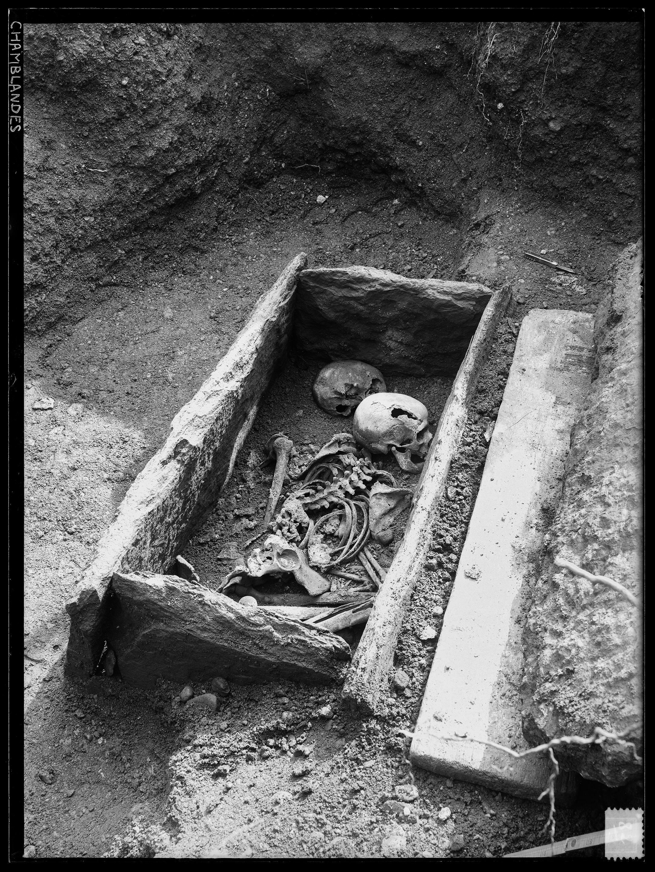 Sépulture N° 1